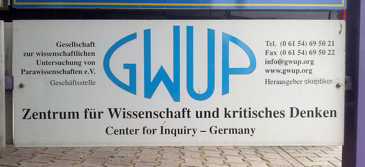 Die Gesellschaft zur wissenschaftlichen Untersuchung von Parawissenschaften in Roßdorf bei Darmstadt.